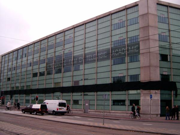 Foto van NFTA genomen op de dag van de moord op Theo van Gogh